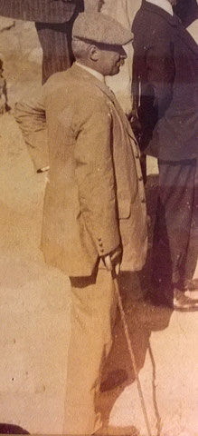 Foto de l'arquitecte Modest Feu